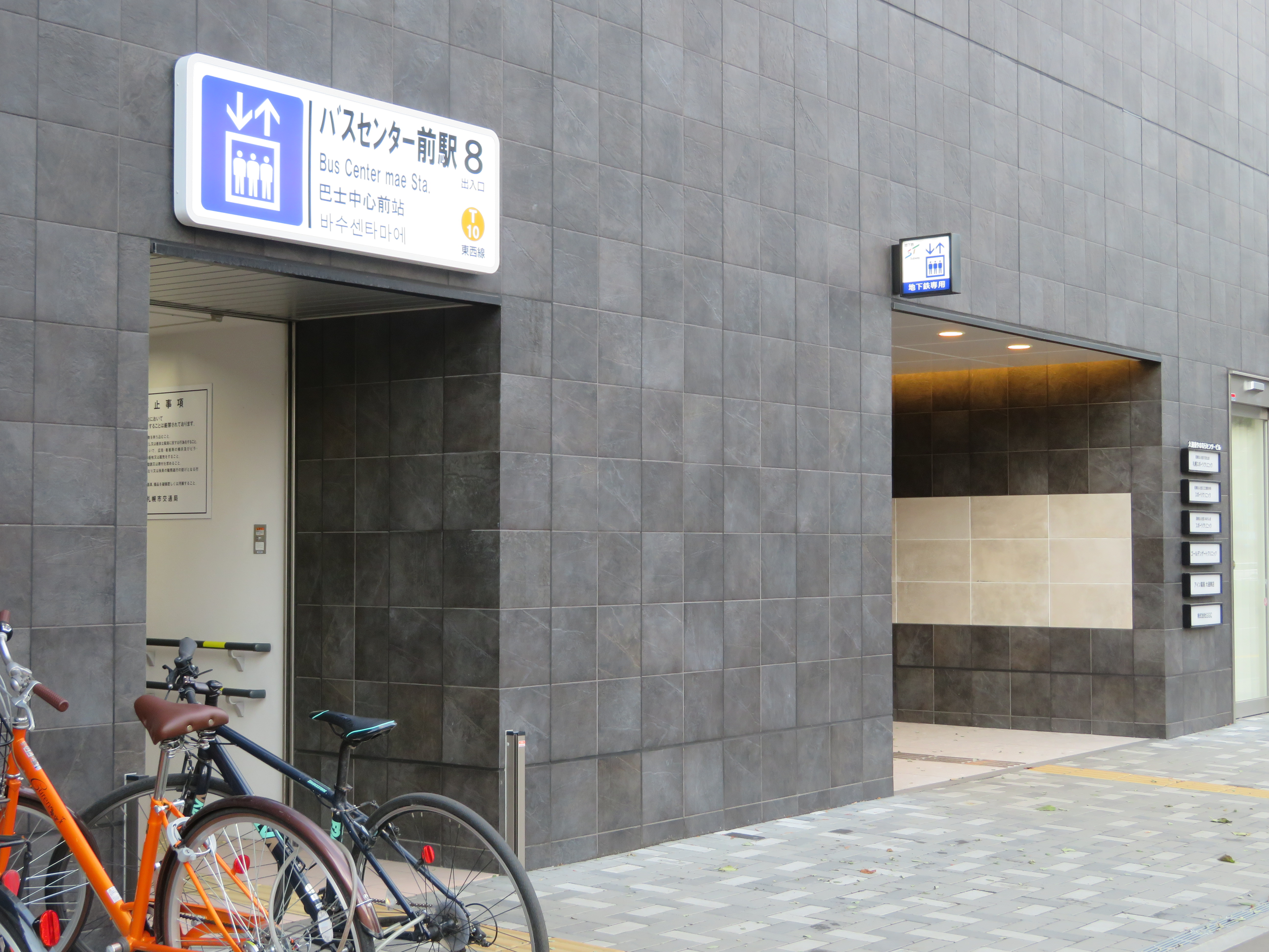 バスセンター前駅8番出入口